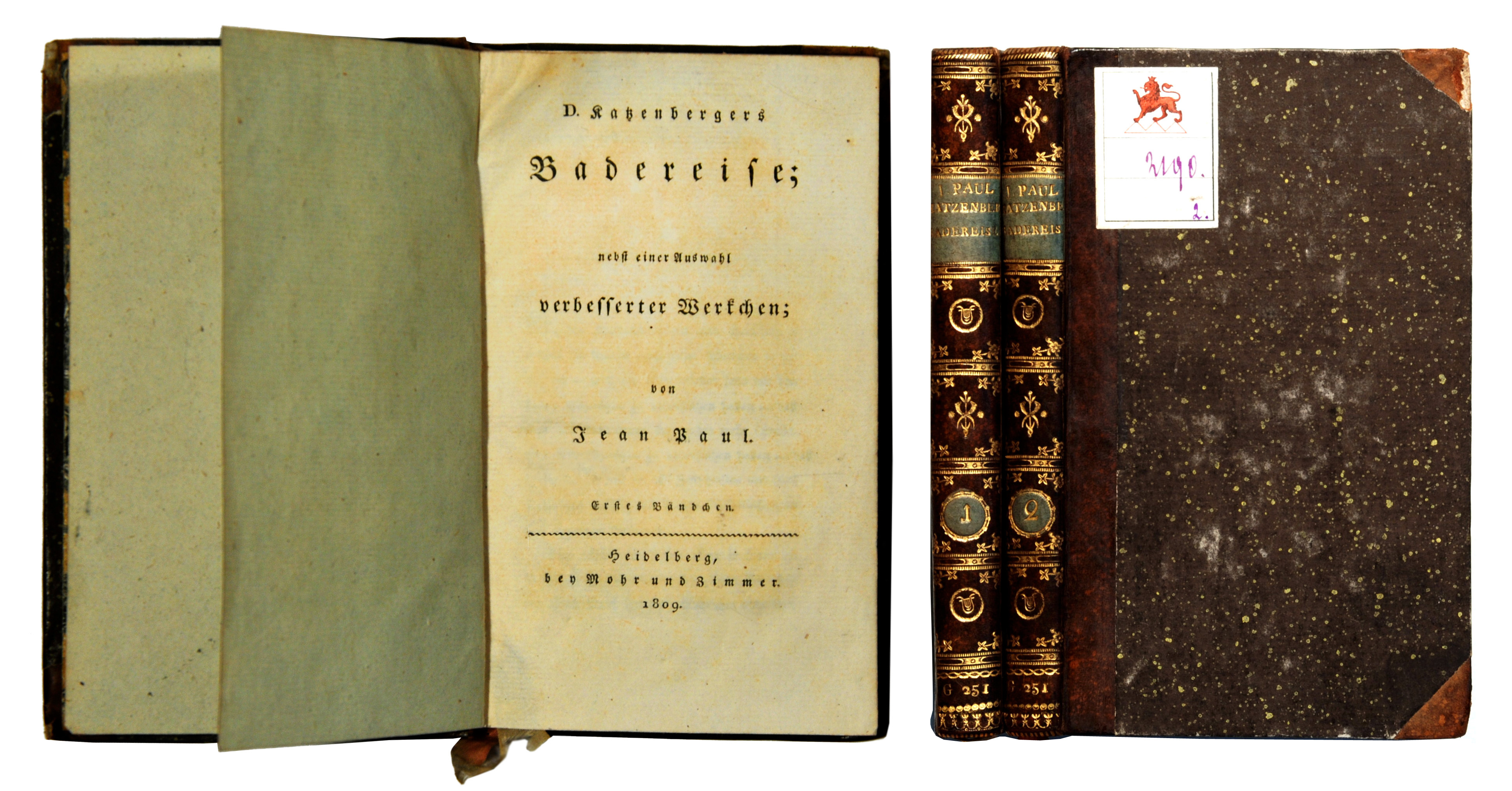 Jean Paul: Dr. Katzenberges Badereise nebst einer Auswahl verbesserter Werkchen. [Titelblatt und zeitgenössischer Einband des Erstdrucks]